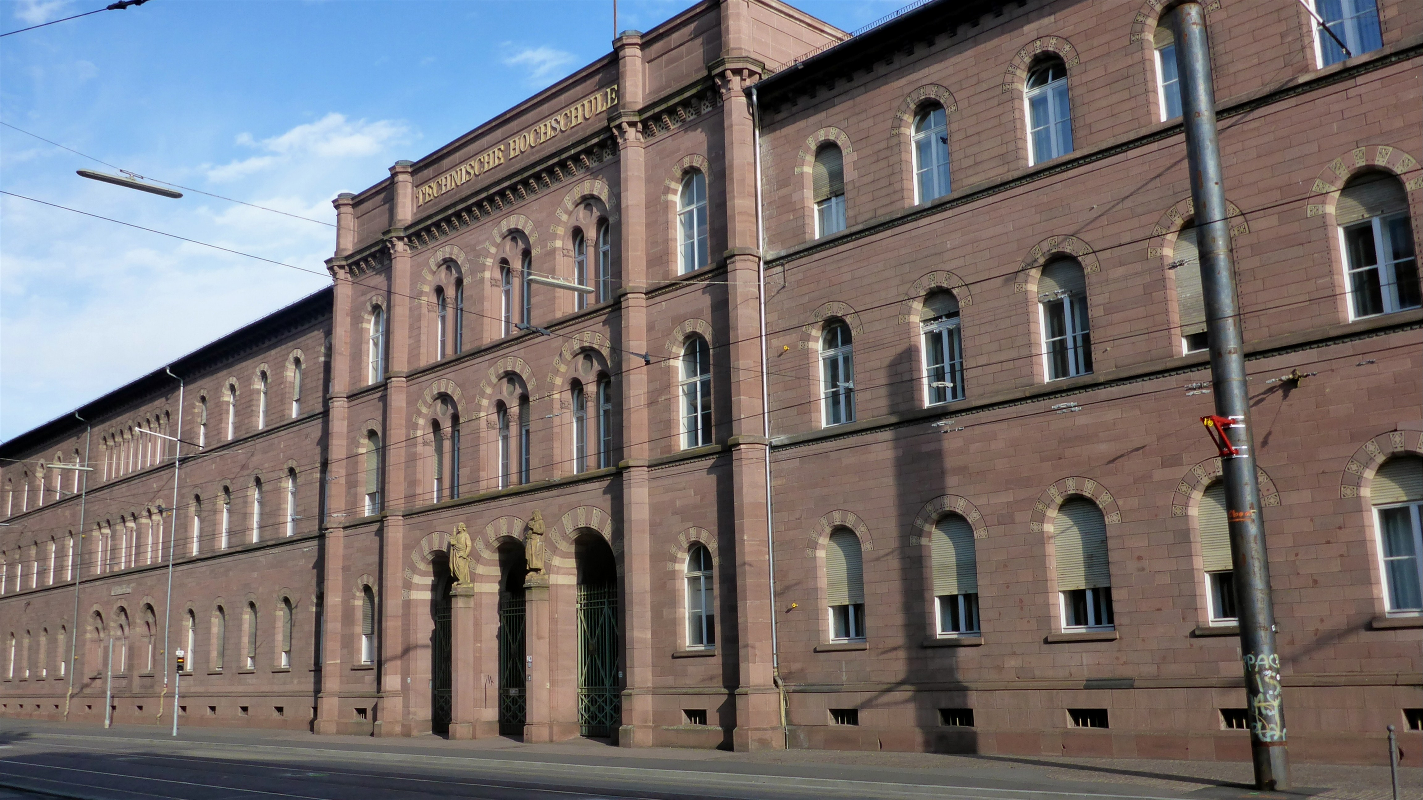 Hauptgebäude des Karlsruhe Institute of Technology (KIT)